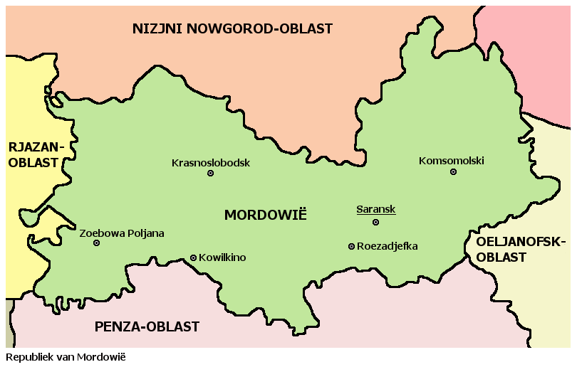 Afrikaanse kaart van Mordowie, Rusland